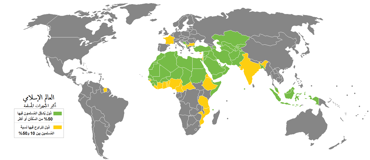 خارطة العالم الإسلامي، وتظهر فيها أكبر الجُمهرات المُسلمة.